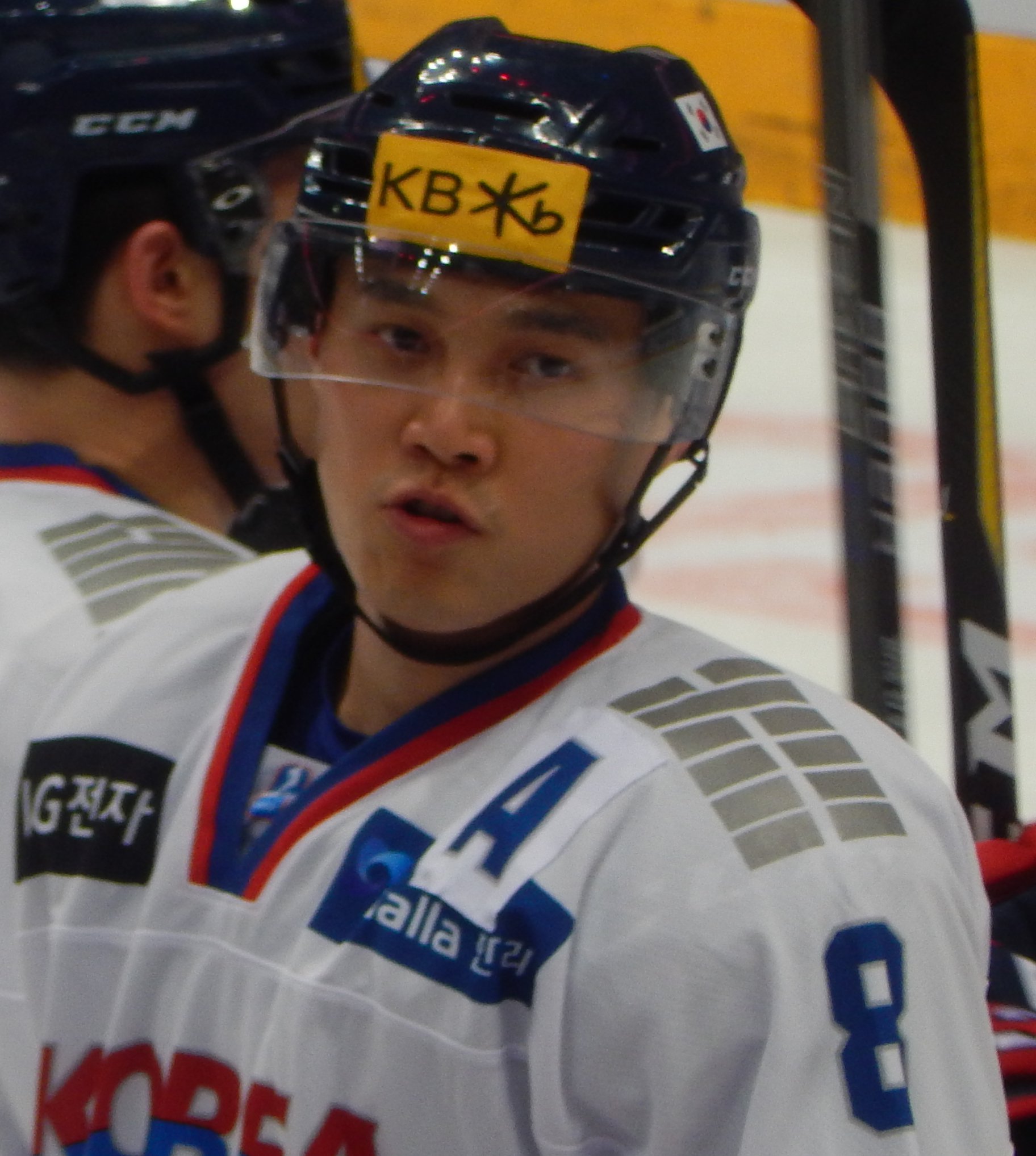 Кубок Первого Канала 2017, матч Финляндия - Южная Корея (15 декабря 2017)